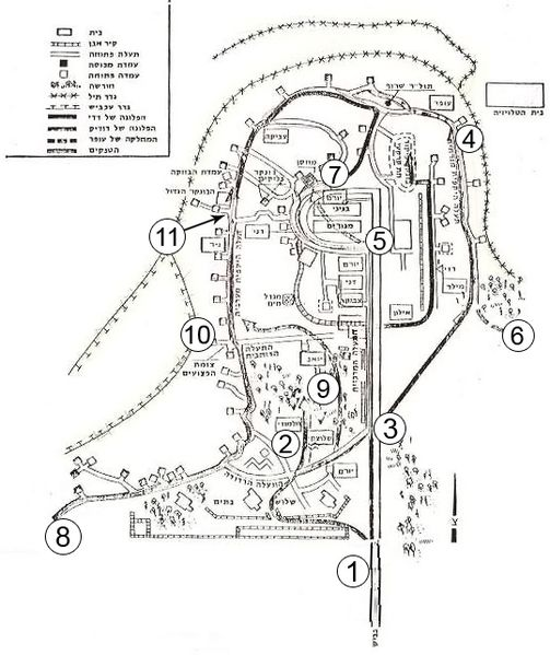 מפת הקרב על גבעת התחמושת